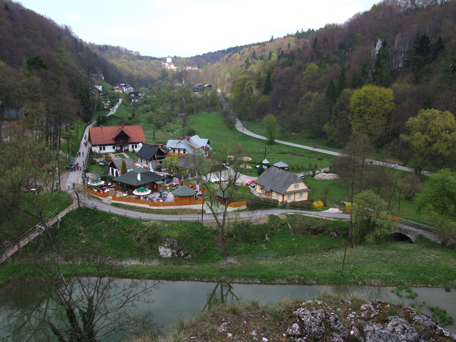 Dolina Prądnika {widok z Jonaszówki)